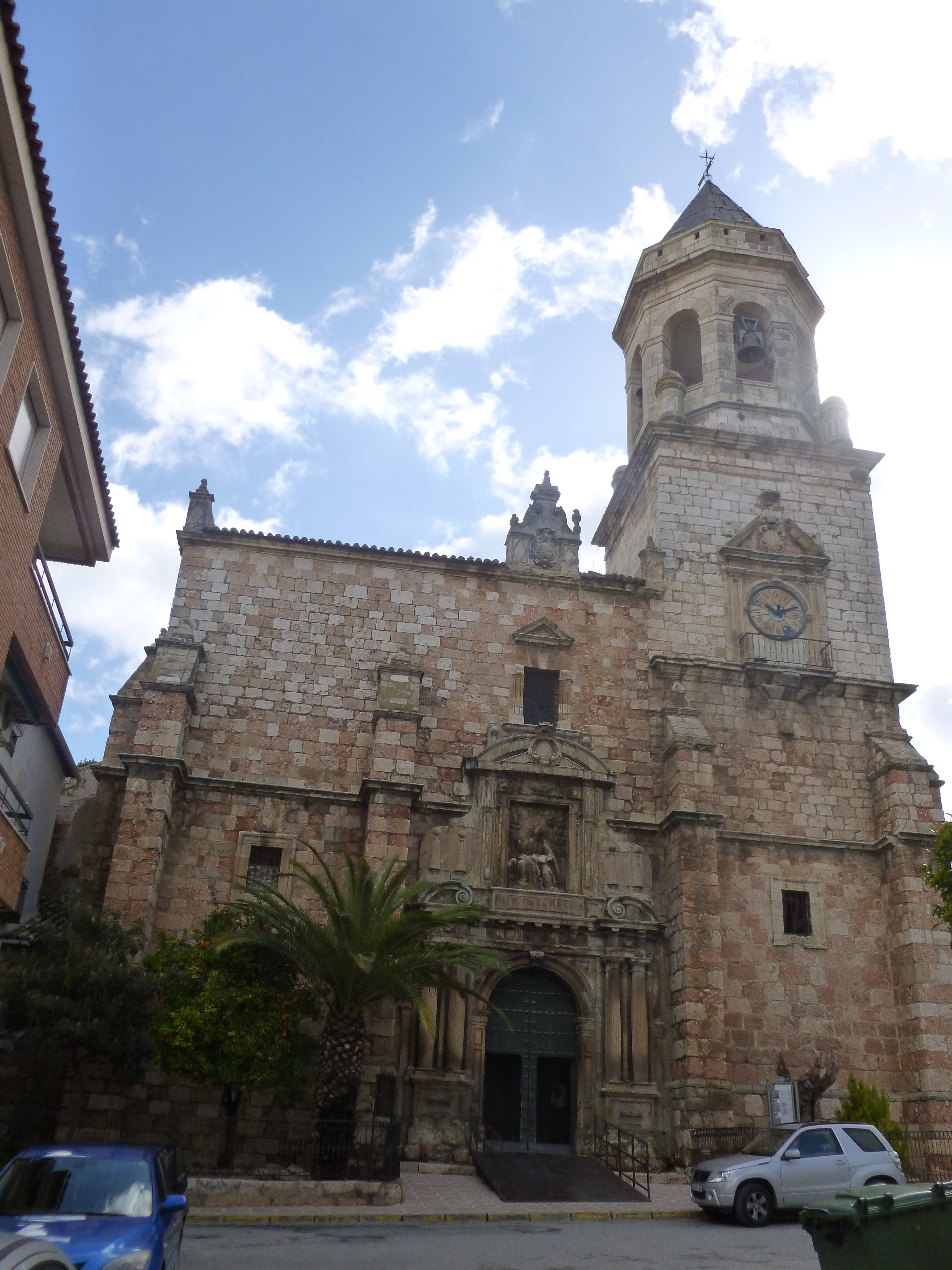 Iglesia de San Juan Evangelista en Mancha Real (provincia de Jaén, España)